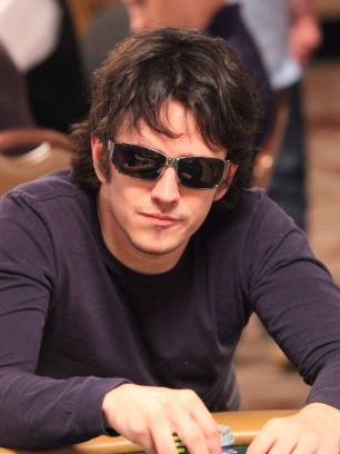 Isaac Haxton bei der World Series of Poker 2010